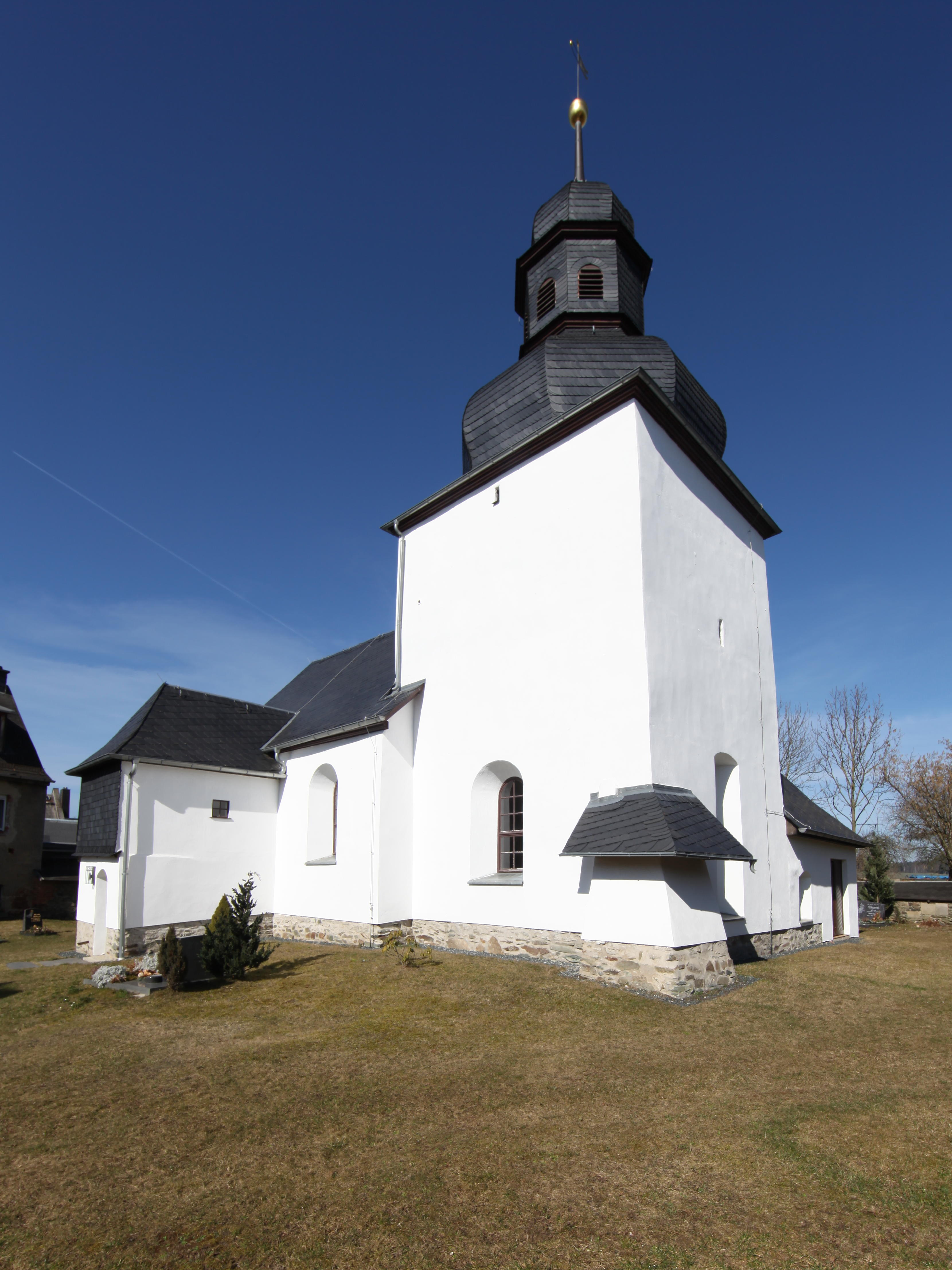 Willersdorf-Ev-Kirche